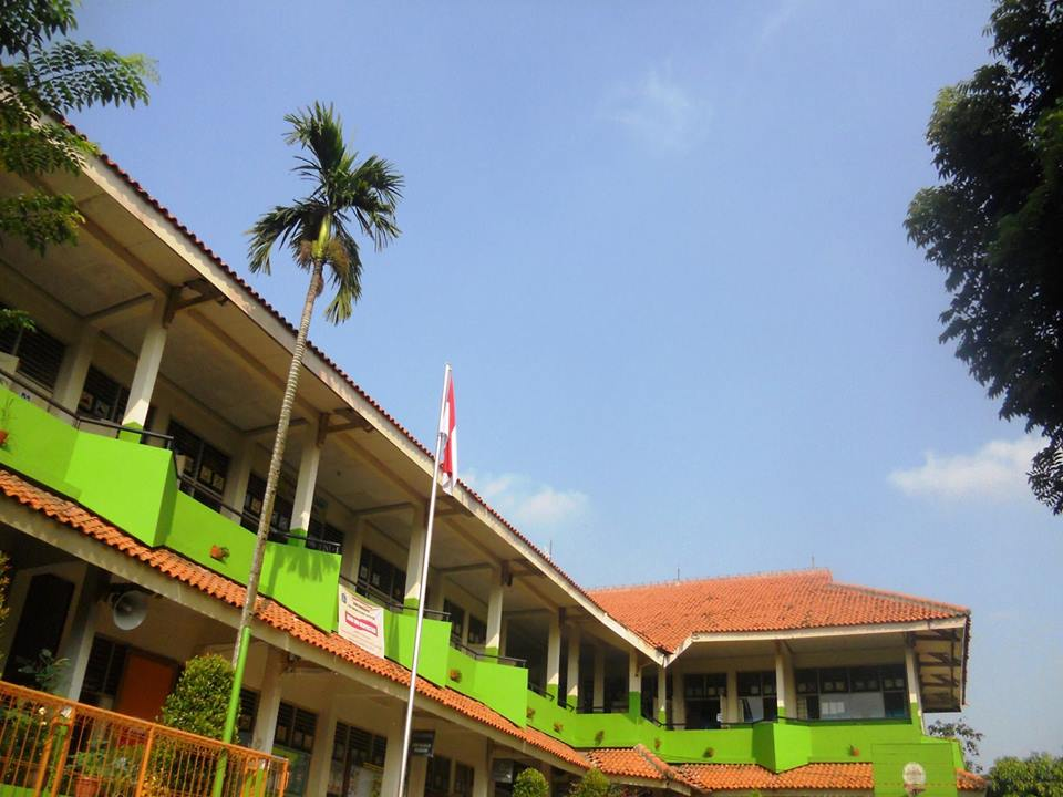 SDN Cibubur 04 Pagi